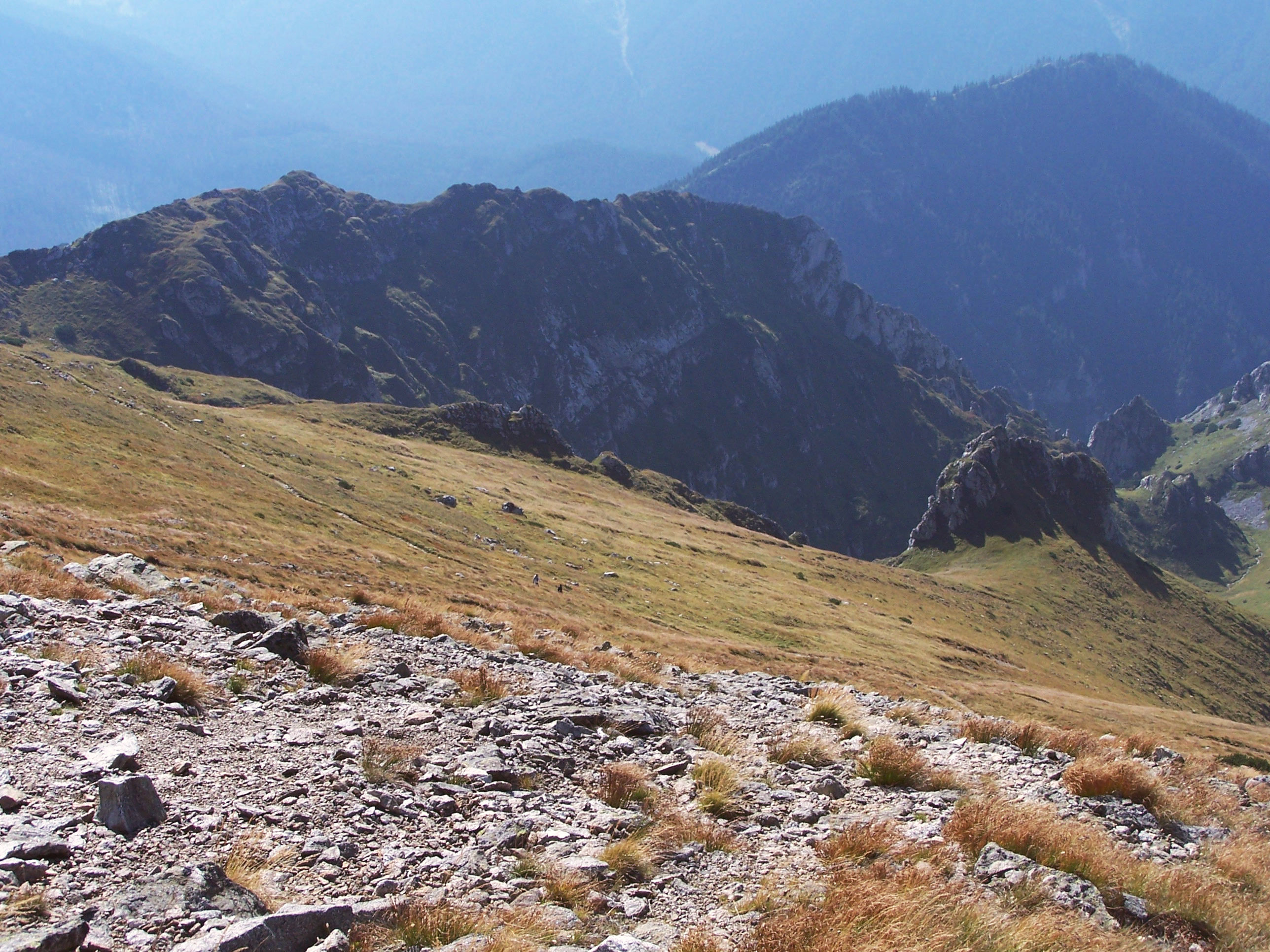 Wysoki Grzbiet (West Tatra Mountains, Ciemniak)